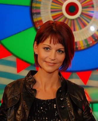 Evelyn Vysher nach ihrem Auftritt bei der Brieflos-Show (Moderiert von Peter Rapp) im ORF. September 2010.